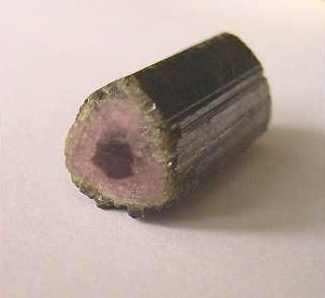 minerał; turmalin (arbuzowy), pochodzenie Wietnam, autor zdjęcia Ewa Jastrzębska 15.06.2006r.